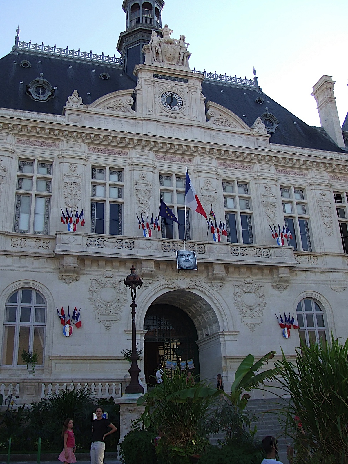 Mairie de Niort